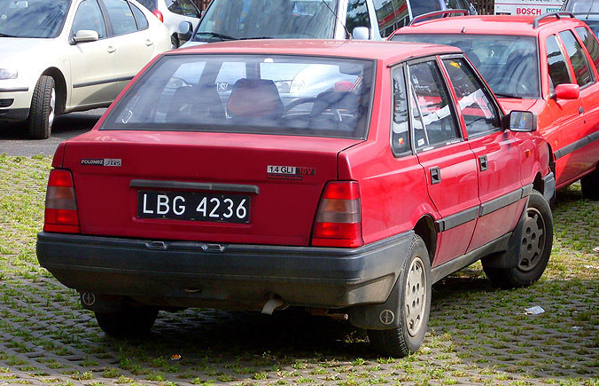 FSO Polonez Atu 1.4 GLI 16v w Lublinie.